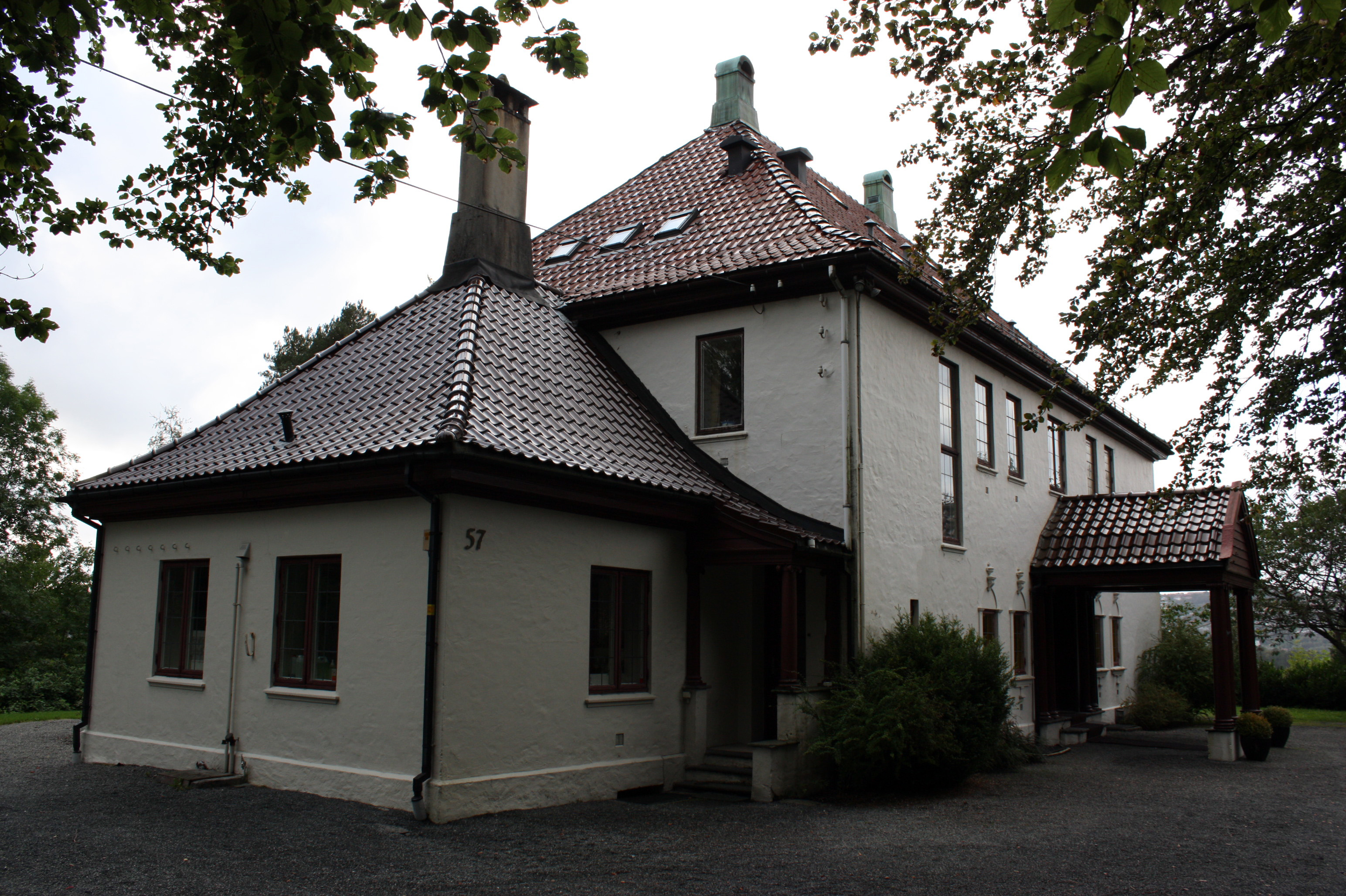 Villa Skjoldnes, Fana, Bergen. By Nordåsvatnet at Sundts veg 57